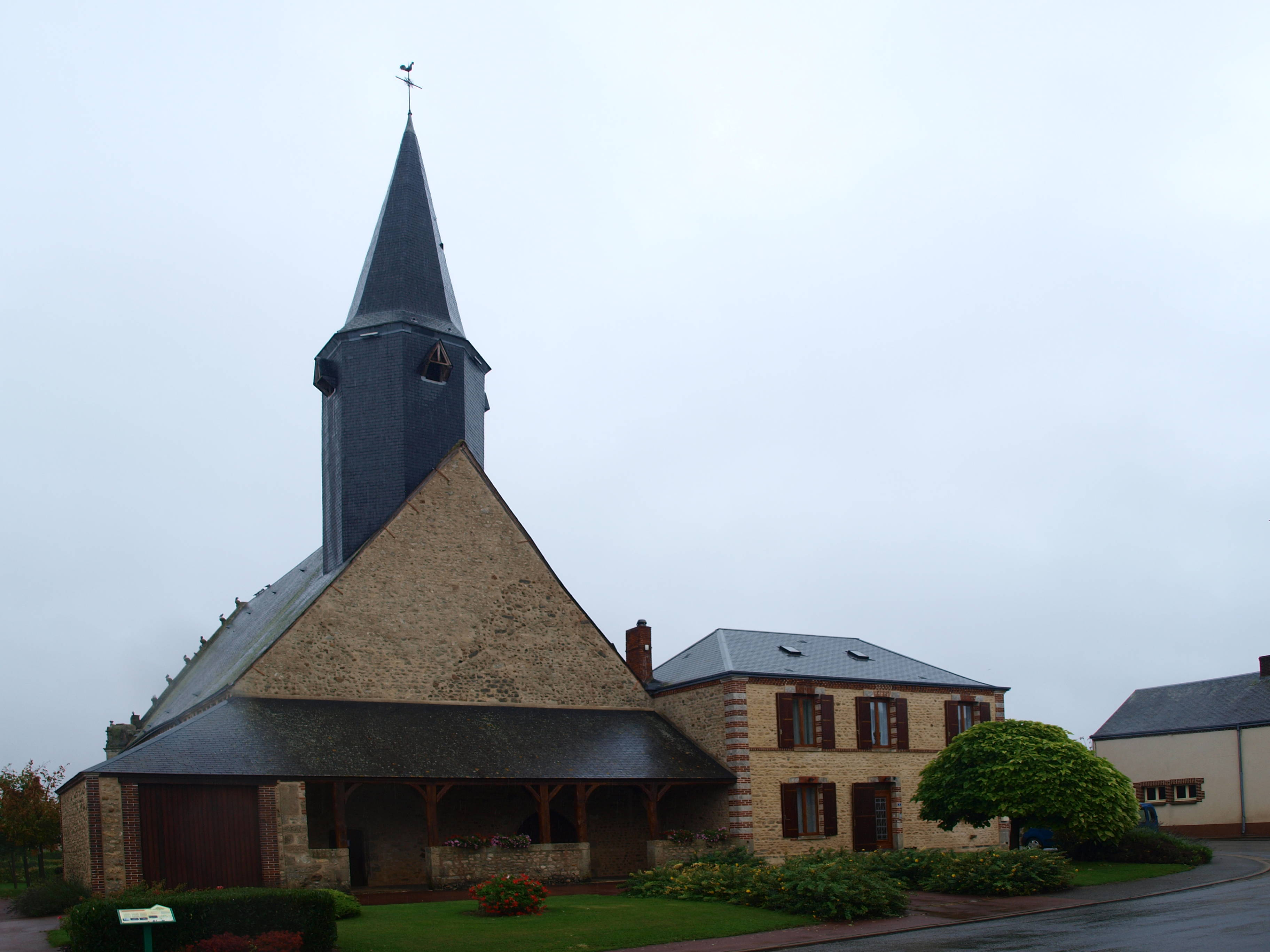 Villiers-Saint-Orien (Eure-et-Loir, France) : église.